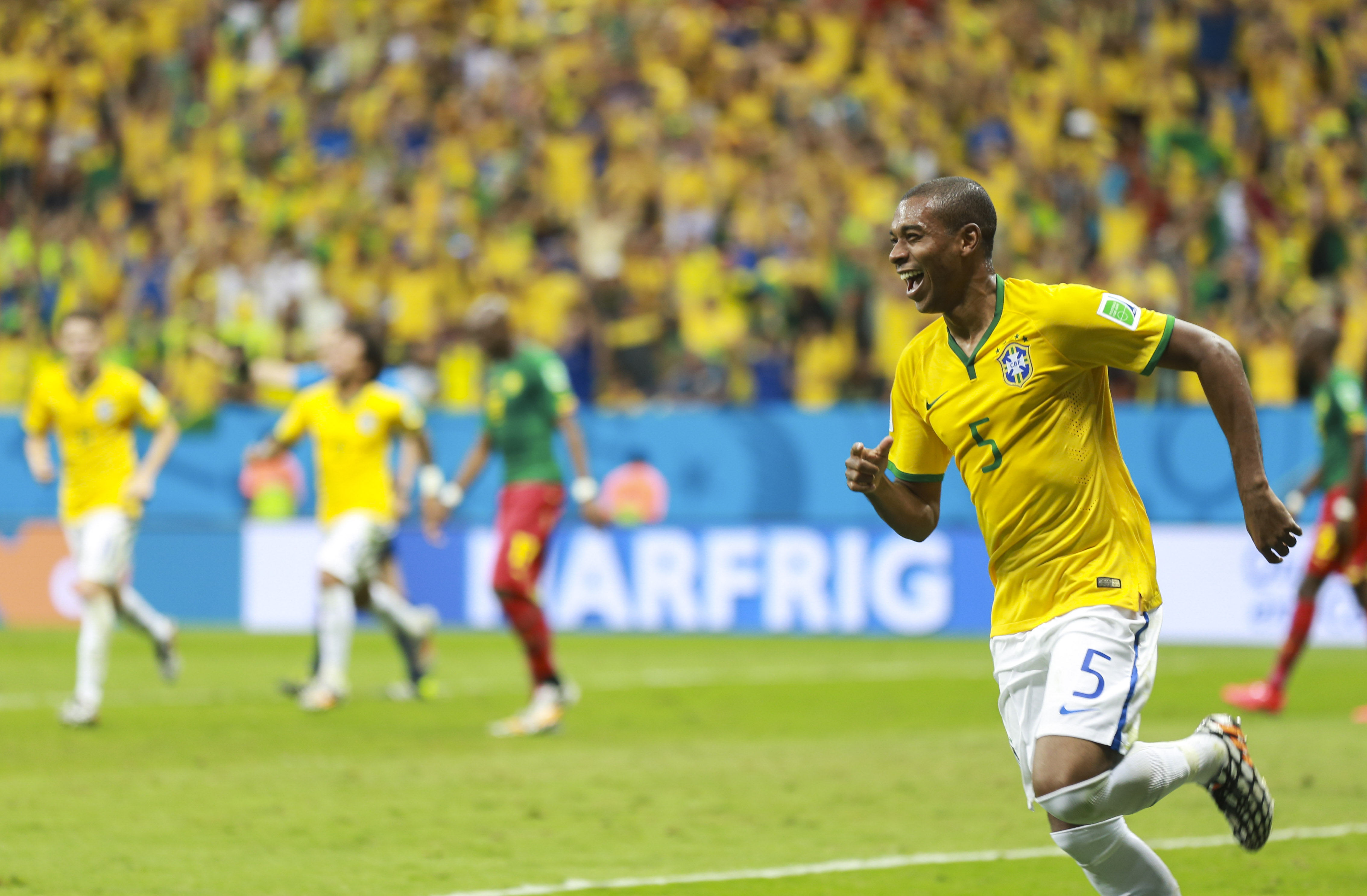 Brasil x Camarões, no Estádio Nacional Mané Garrincha em Brasília.